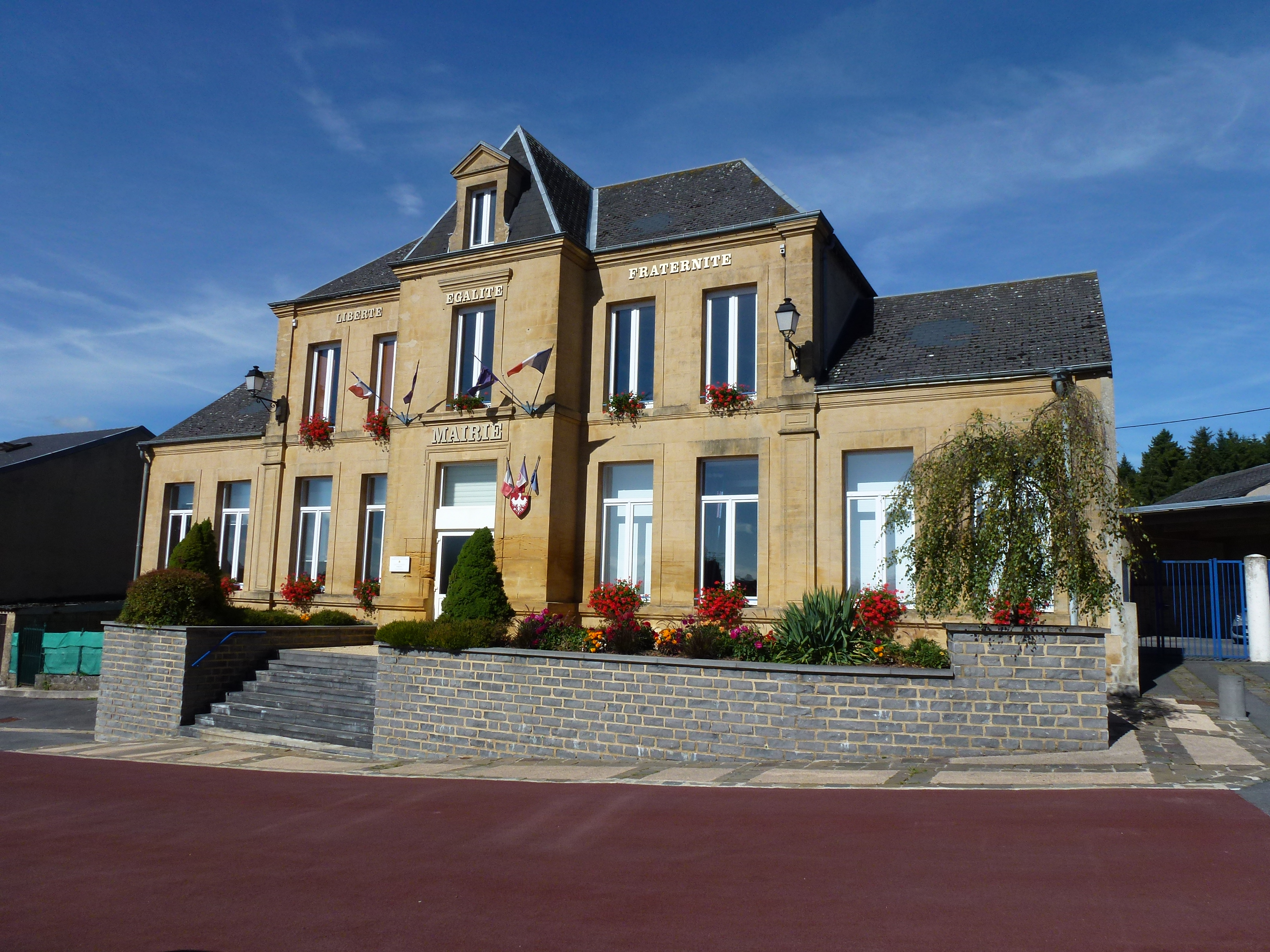 Rimogne (Ardennes) mairie